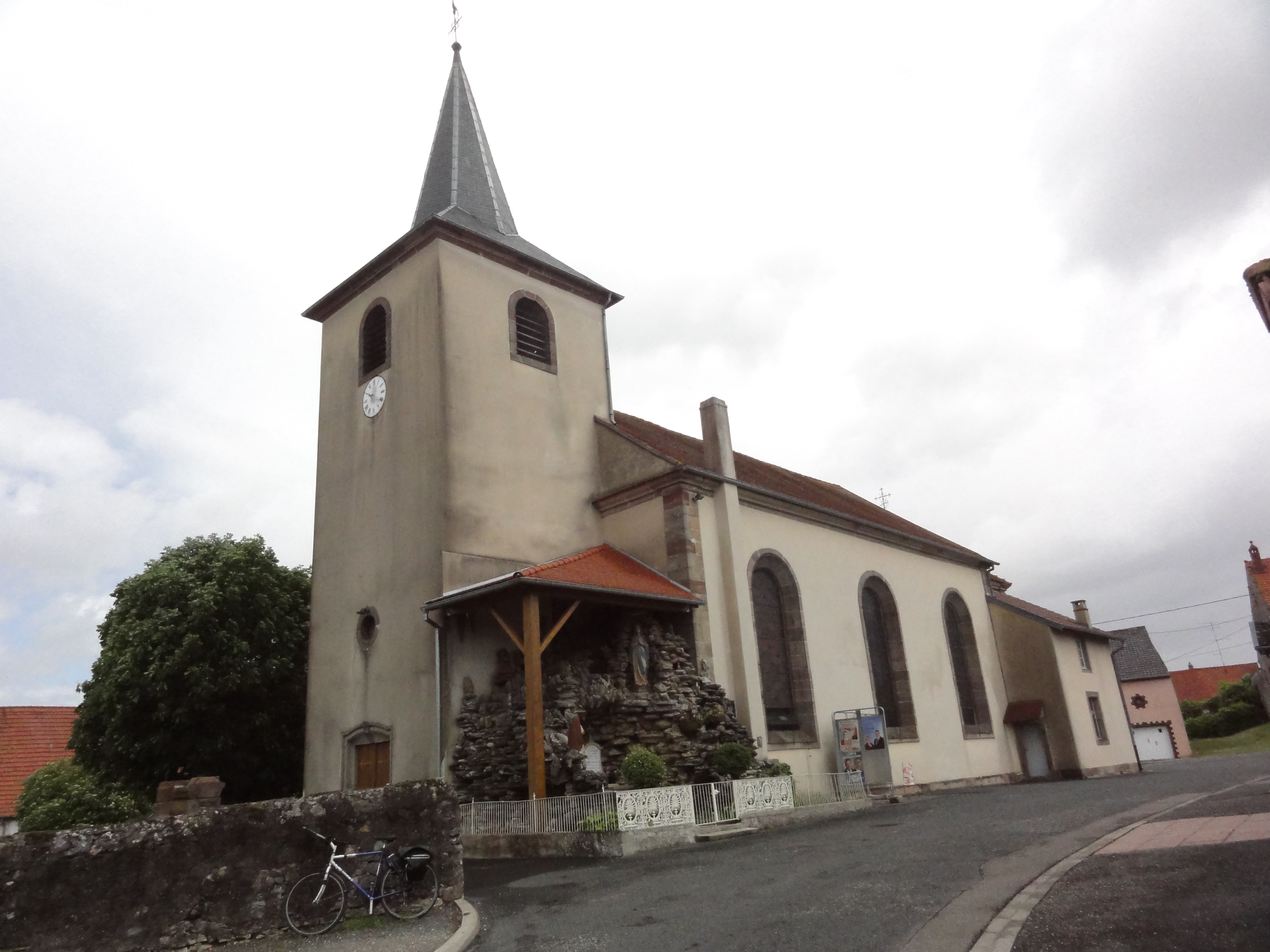 Fleisheim (Moselle) église